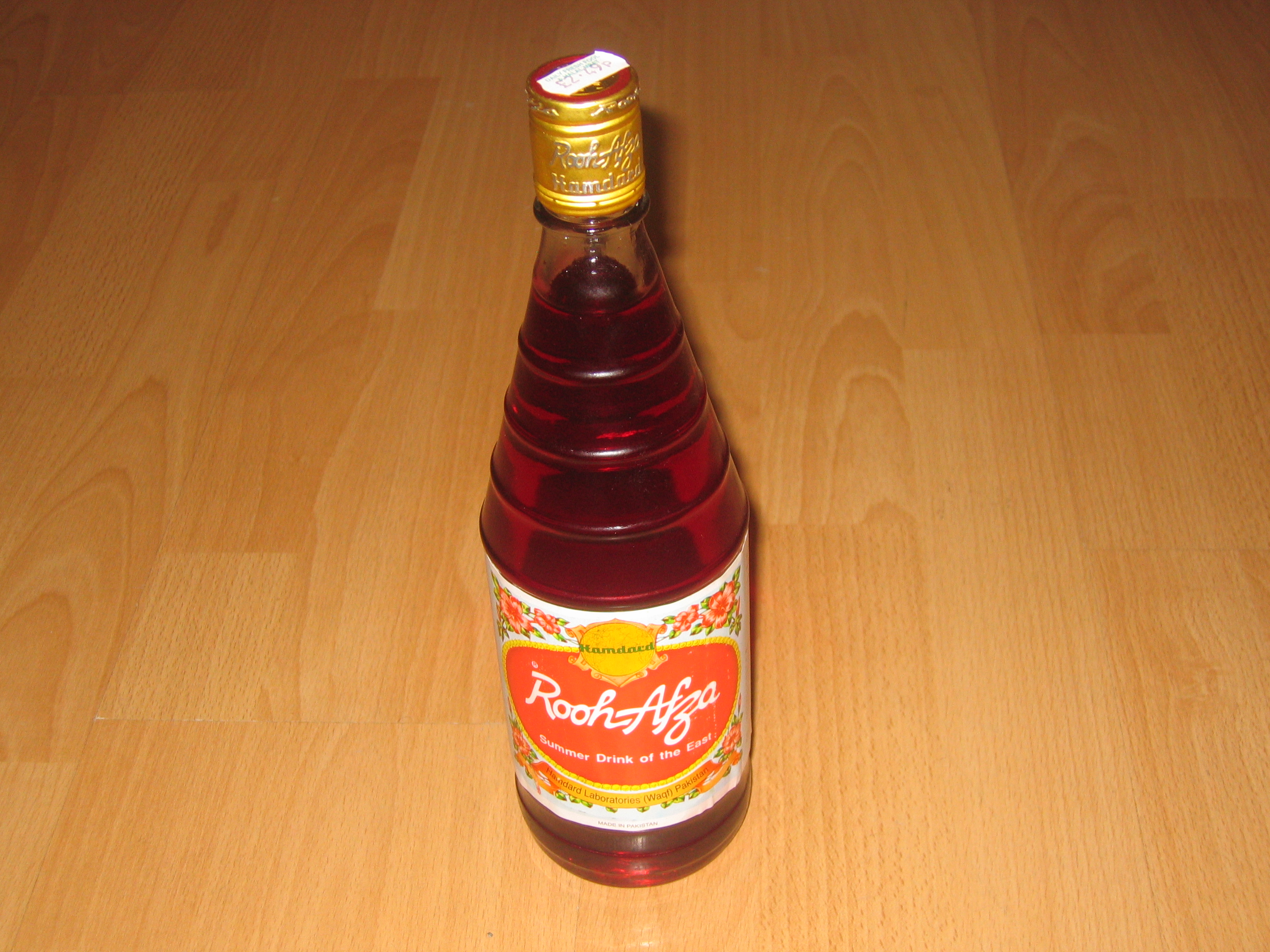 Man sieht eine Flasche Rooh Afza